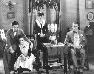 Louise Brooks en Ford Sterling in The Show Off, een stomme film uit 1926 De film is publiek domein gezien de auteursrechten zijn verlopen. Still van .